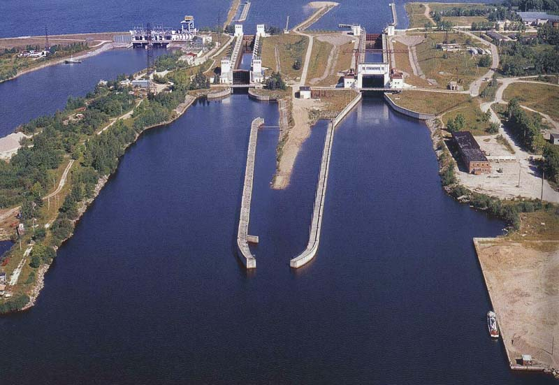 Volqa-Baltik su yolu